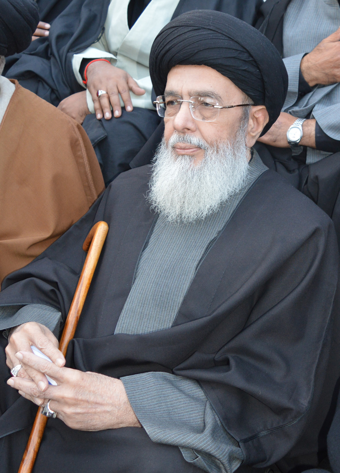 سربراہ تحریک نفاذ فقہ جعفریہ آغا سید حامد علی شاہ موسوی